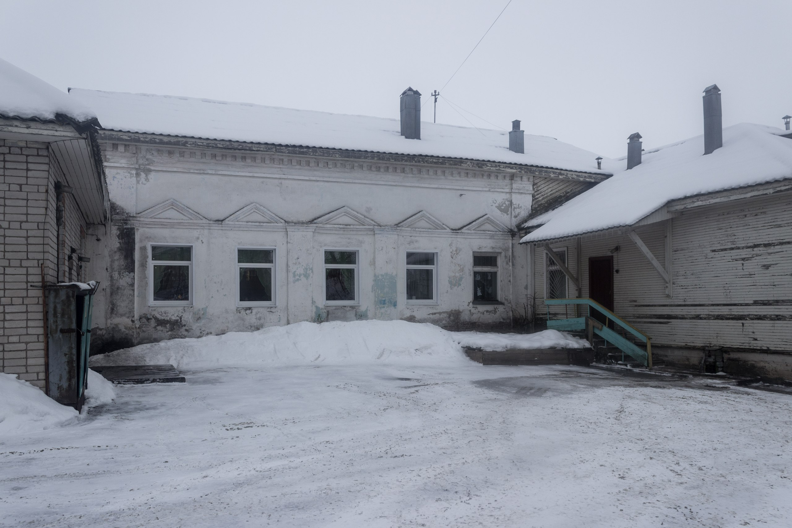 Бывшая Петропавловская церковь в Соломенном